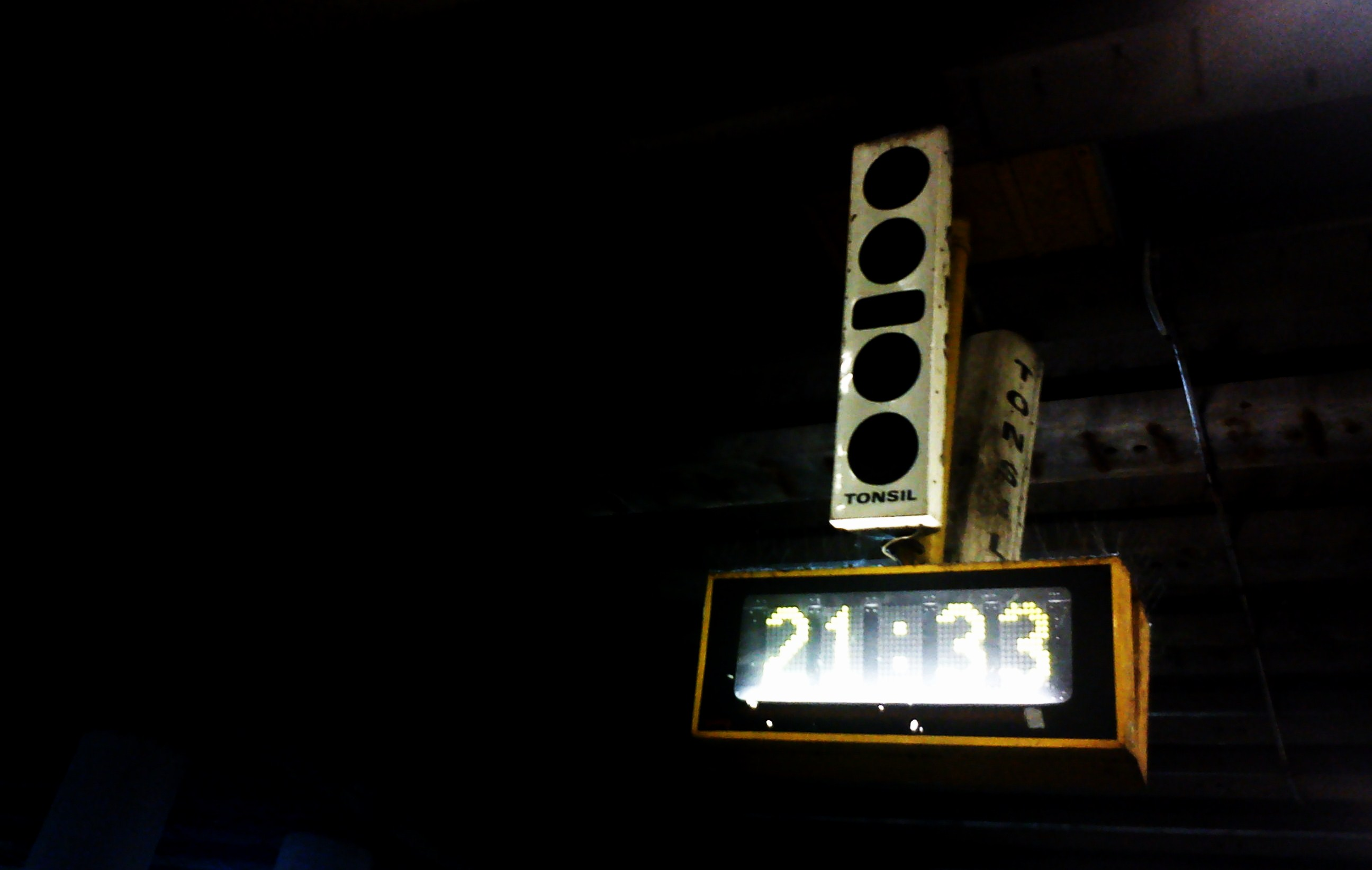 PST, Poznań. Klimaty nocne.